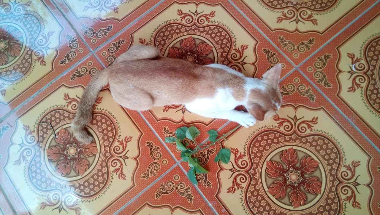 Brown cat play with acalypha indica tree at the back house, he so love root of acalypha indica